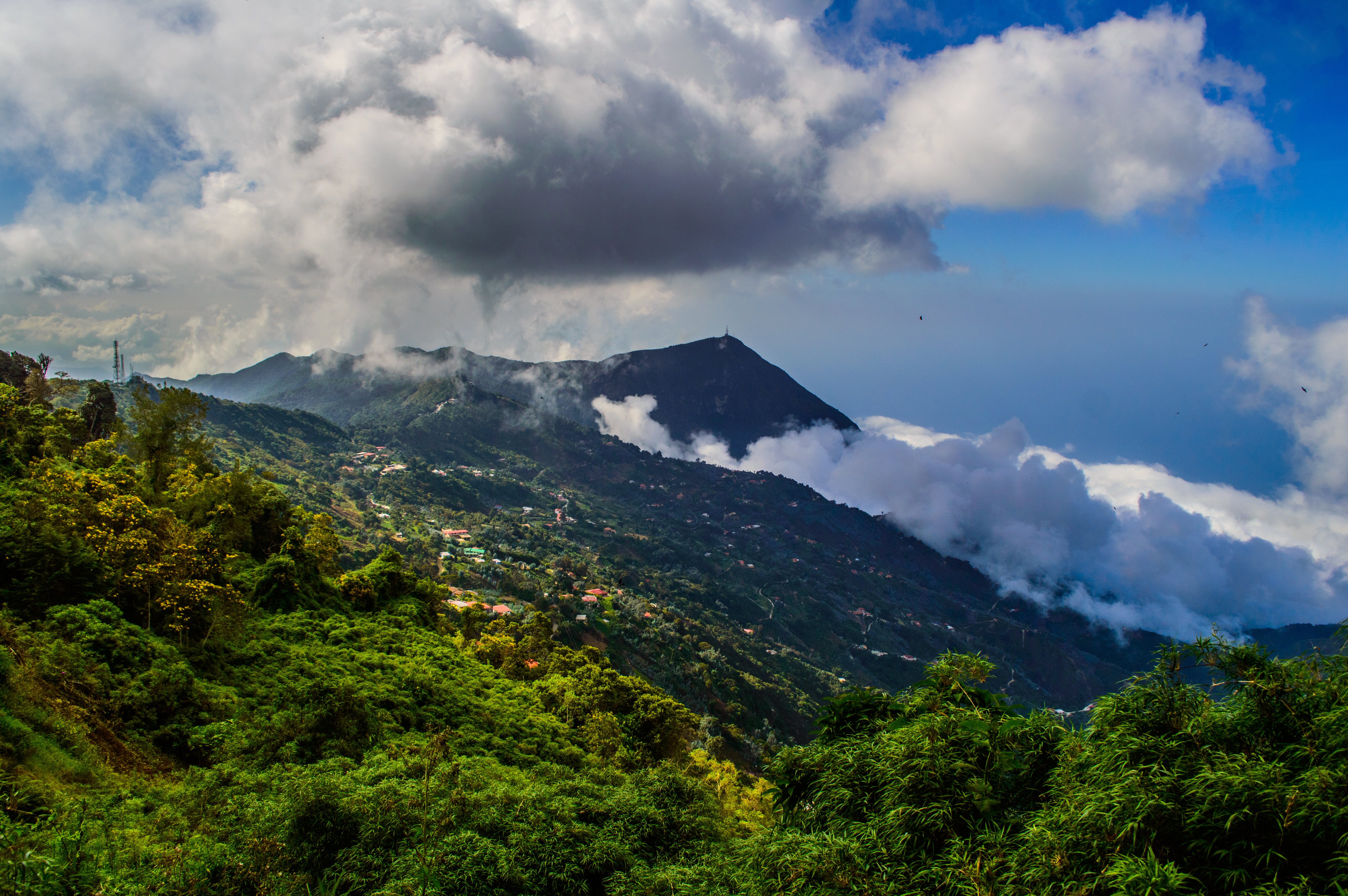 Picacho de Galipan en el Parque nacional Avila